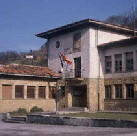 Ayuntamiento de Bimenes